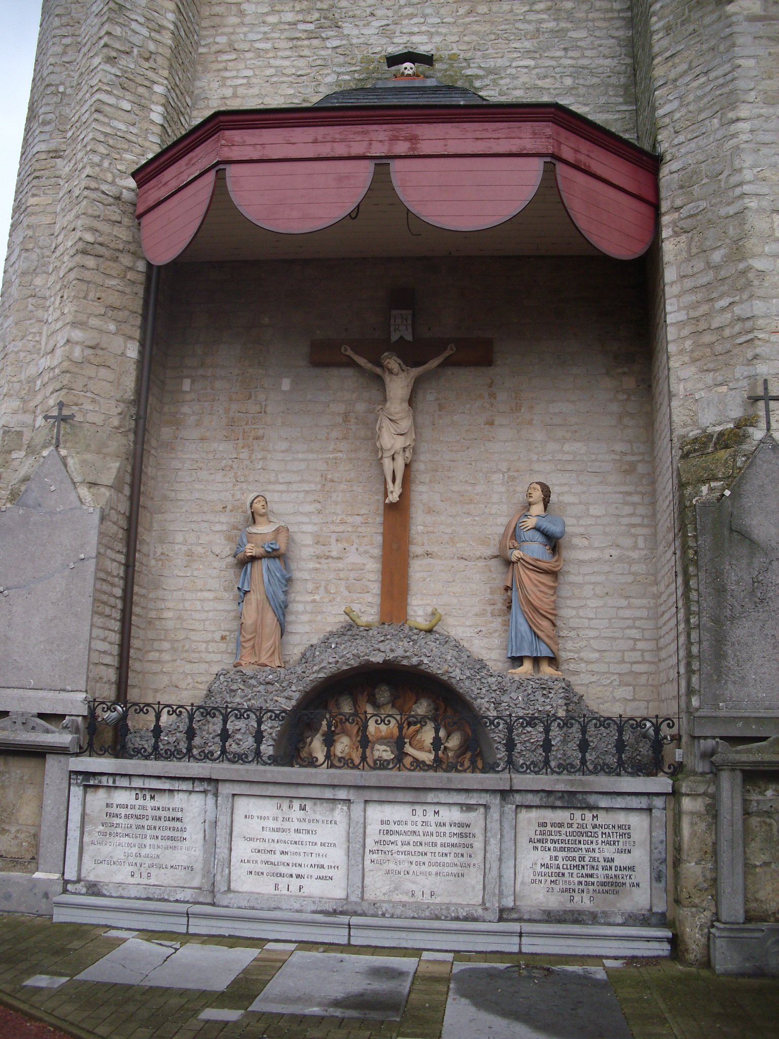 Kalvarie aan de kerk van Schellebelle - Wichelen - Oost-Vlaanderen - België